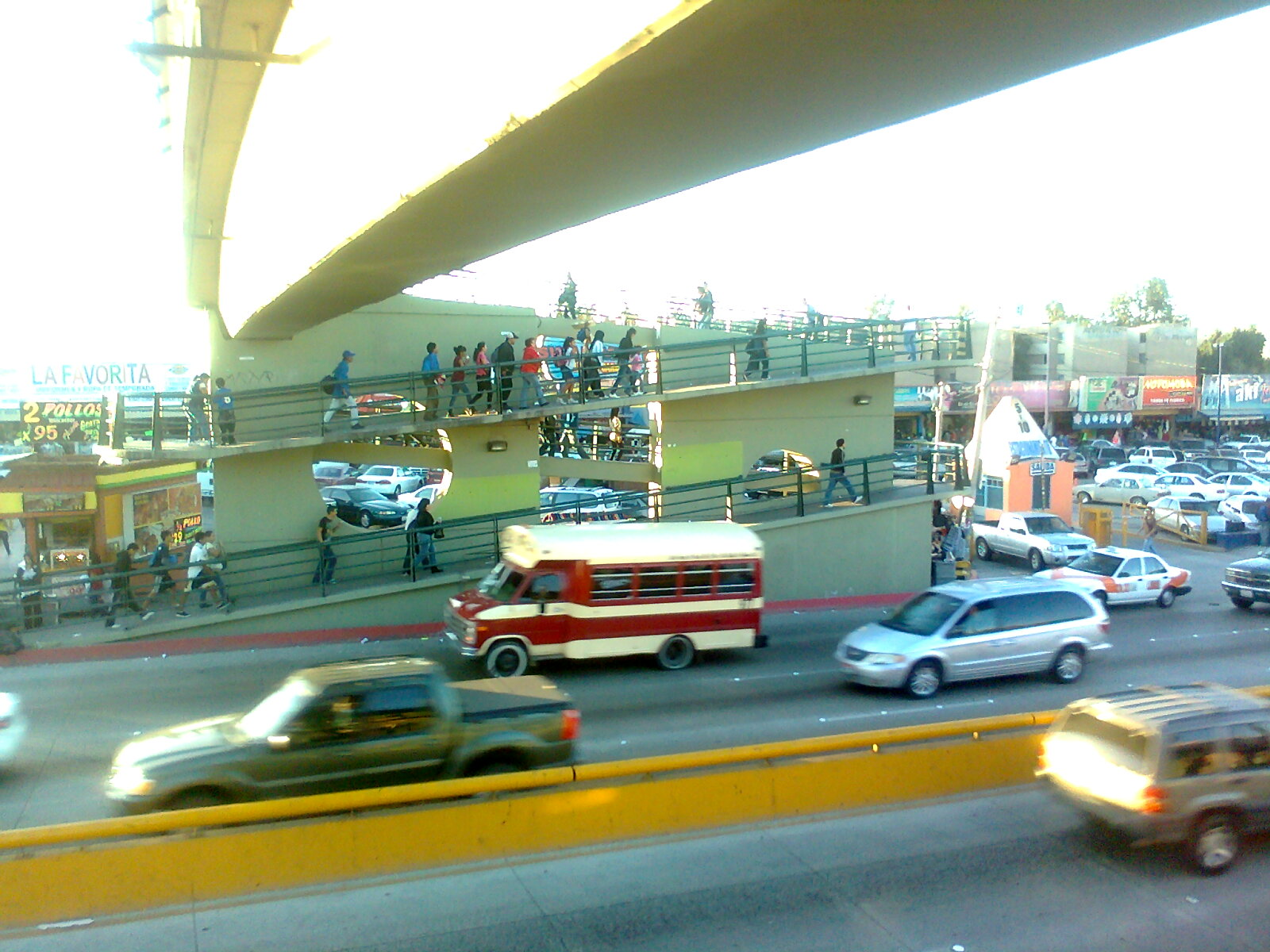 Trafico urbano desde el Puente 5 y 10